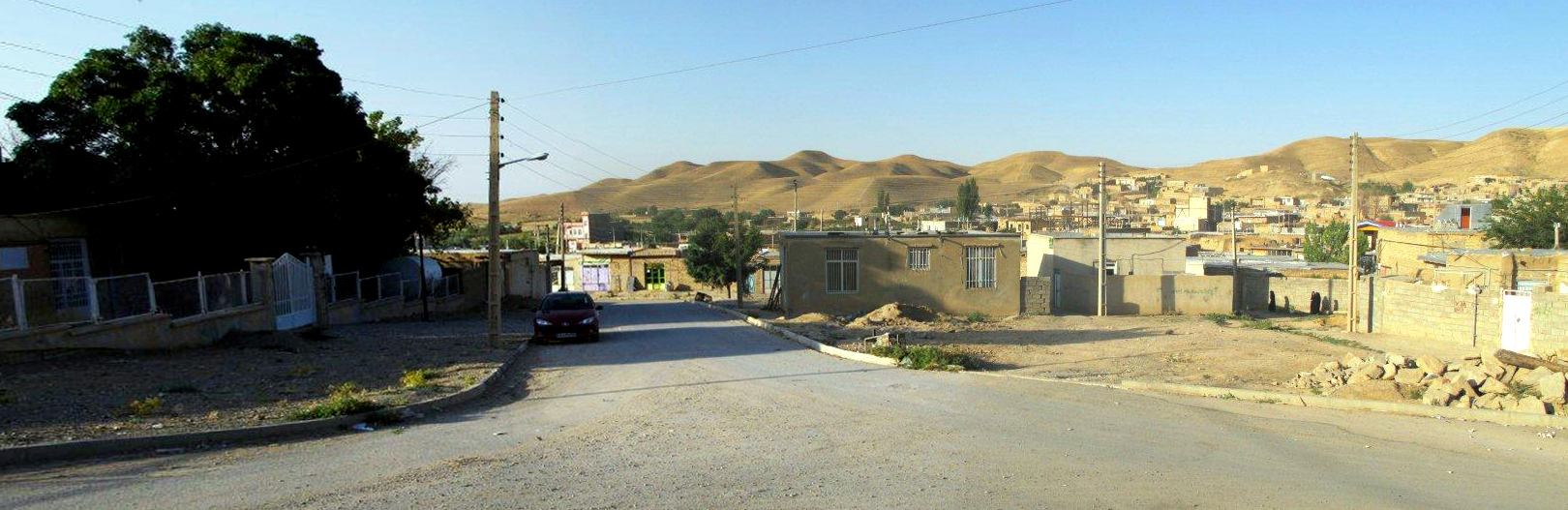 تۆرکجه: توپ آغاج شهری بیجار بولگه سینین یئنی شهرلریندن